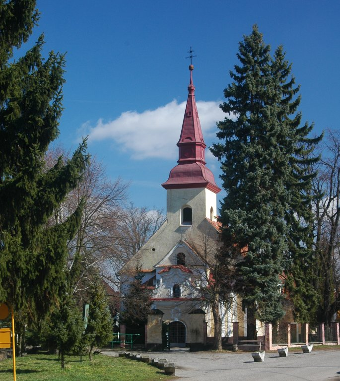 Dojč, church